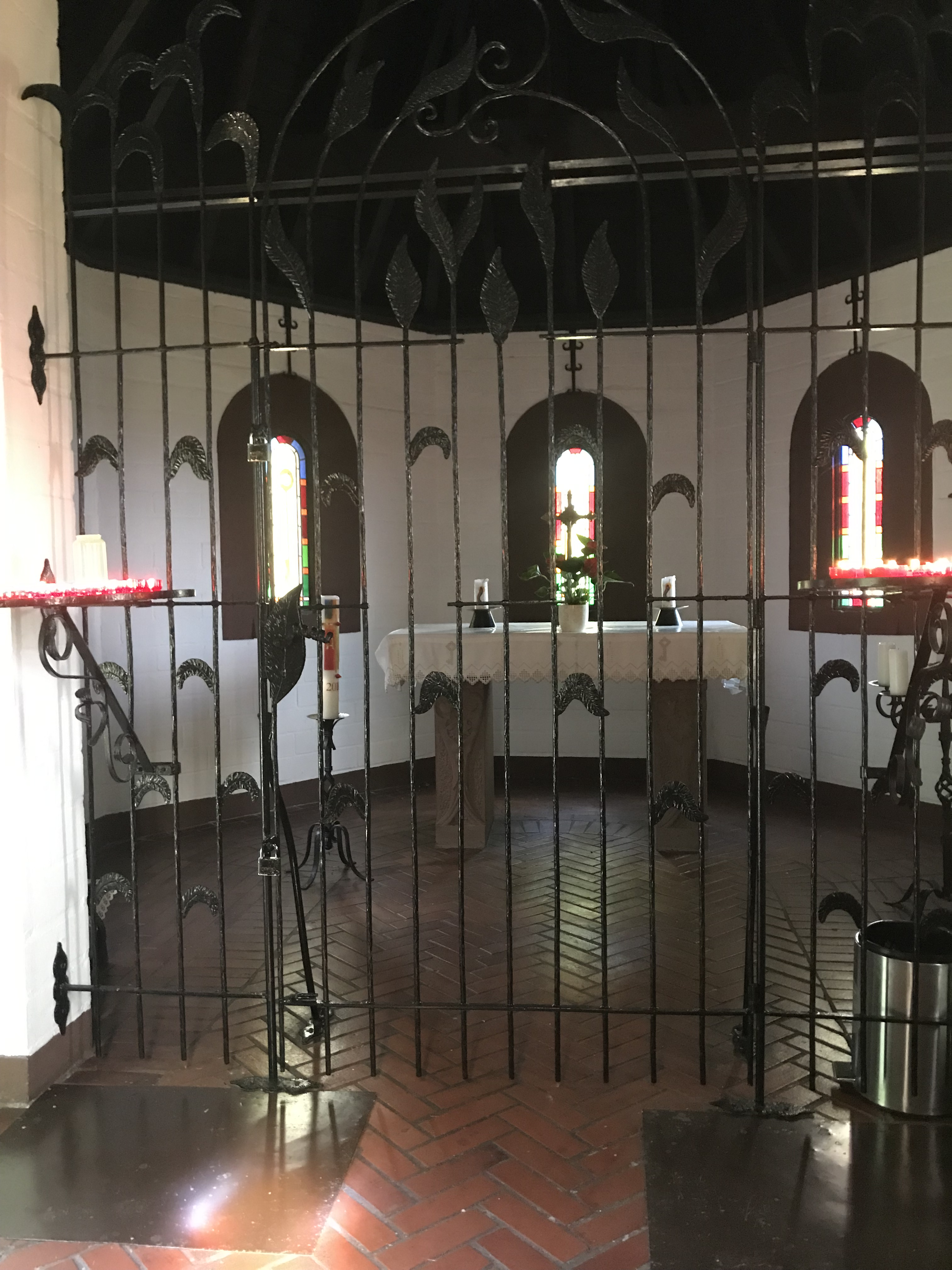 Peterbergkapelle Ansicht Altarraum